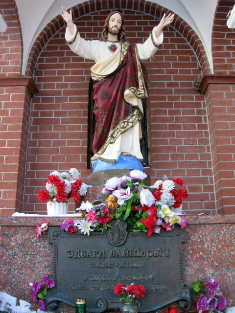 Беларуская (тарашкевіца): Месца пахаваньня Эдварда Вайніловіча ля Чырвонага касьцёла